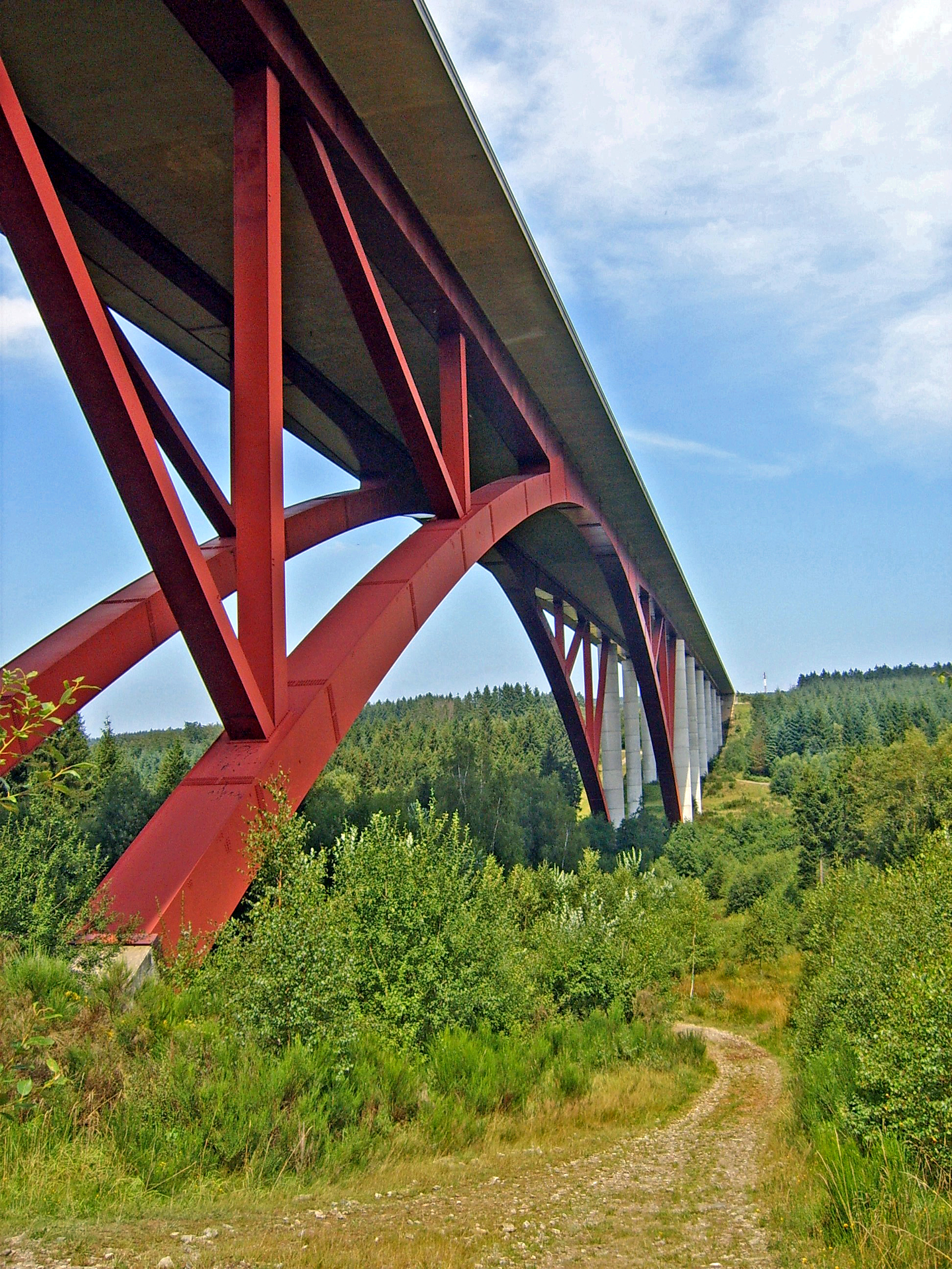 Sujet:Eau-Rouge-Bréck.